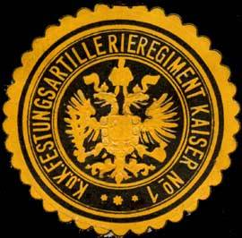 Sealing stamp Title: K.u.K. Festungsartillerieregiment Kaiser No. 1 Description: gelb, schwarz, geprägt Place: size: 4 cm